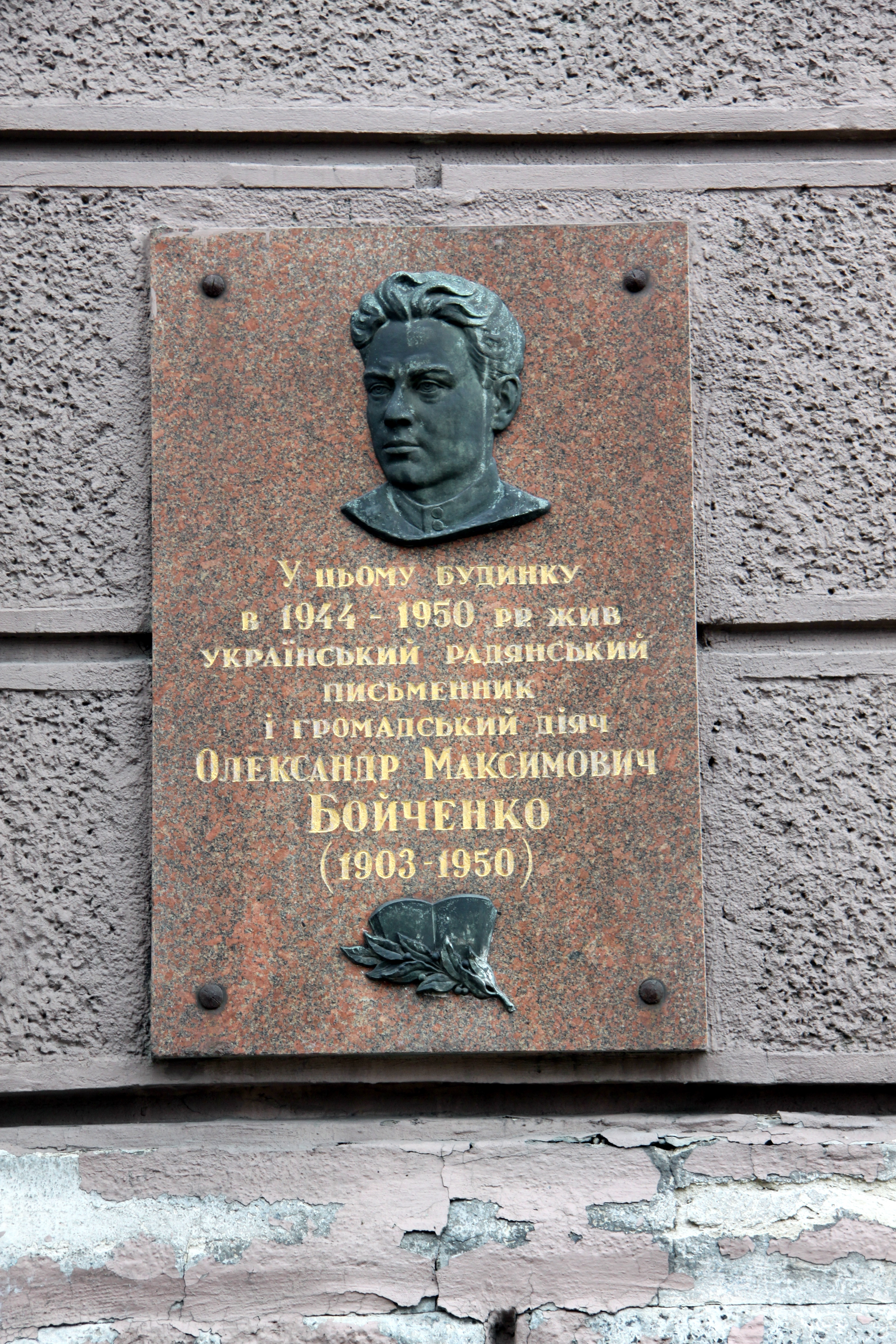 Будинок житловий, в якому у 1944—1950 рр. мешкав Бойченко О. М., письменник, партійний діяч, Київ, Грушевського Михайла вул., 9